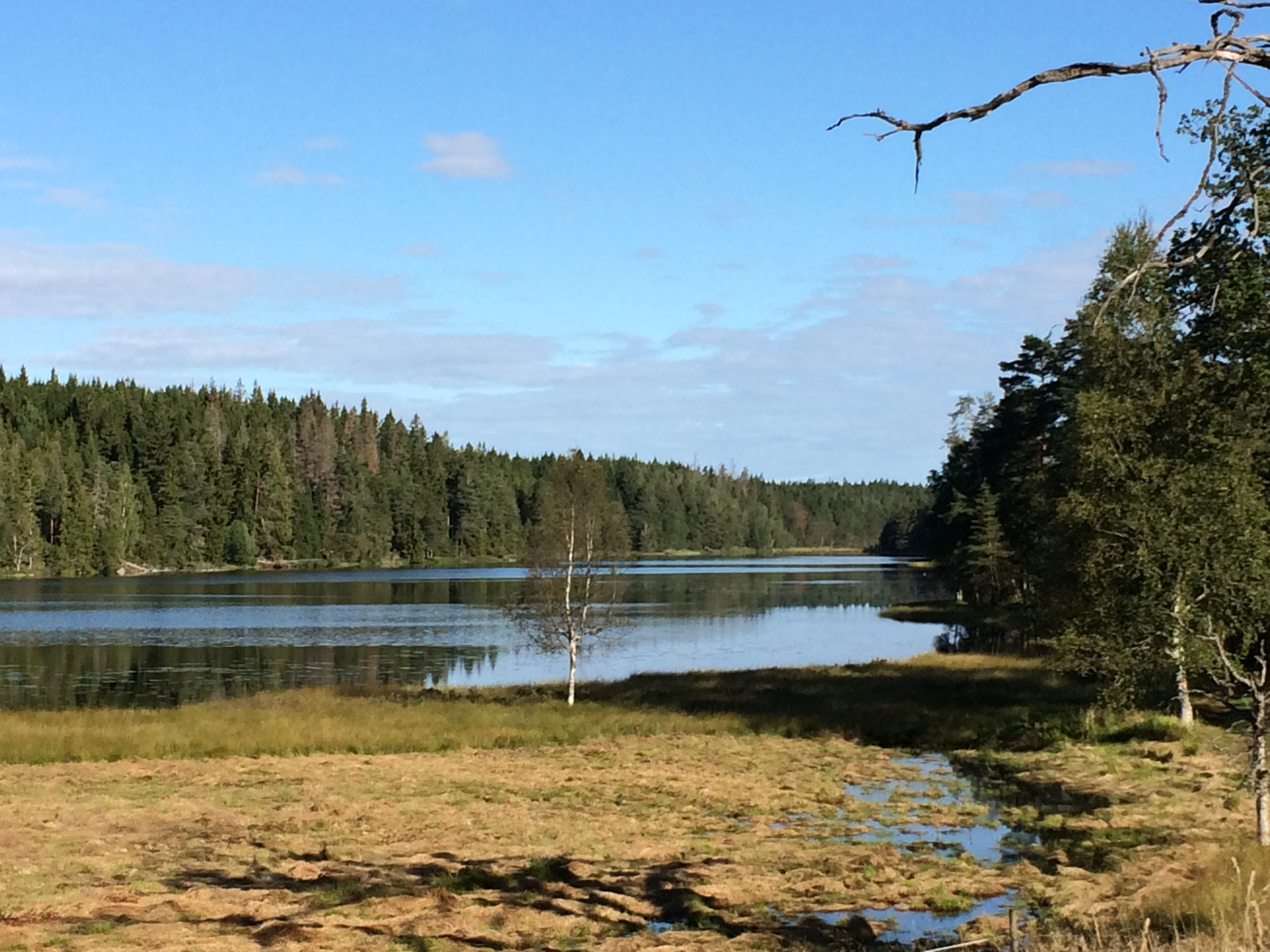 Bergsjön, Hunneberg